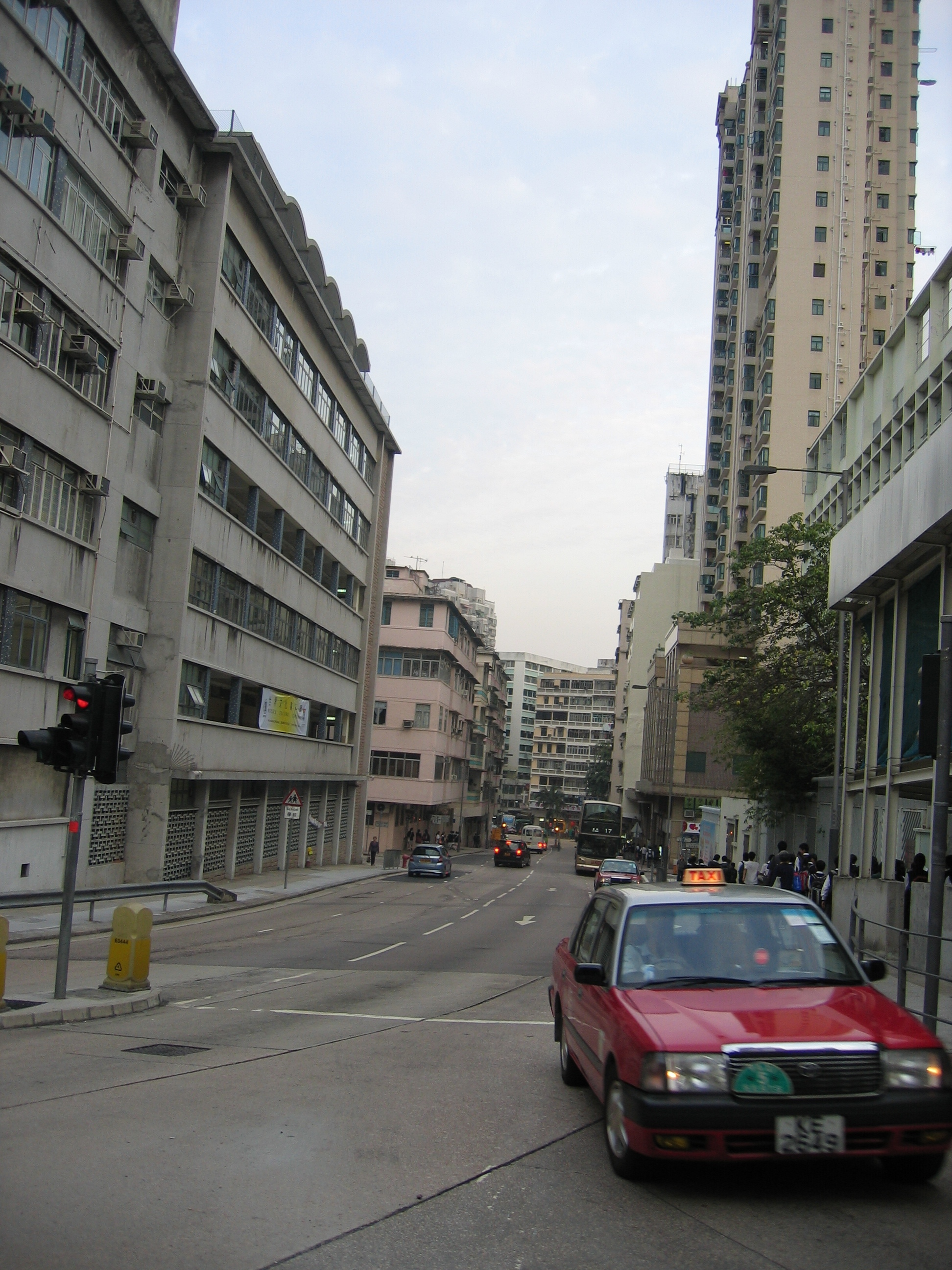 Tin Kwong Road,Ho Man Tin,Kowloon,Hong Kong,China